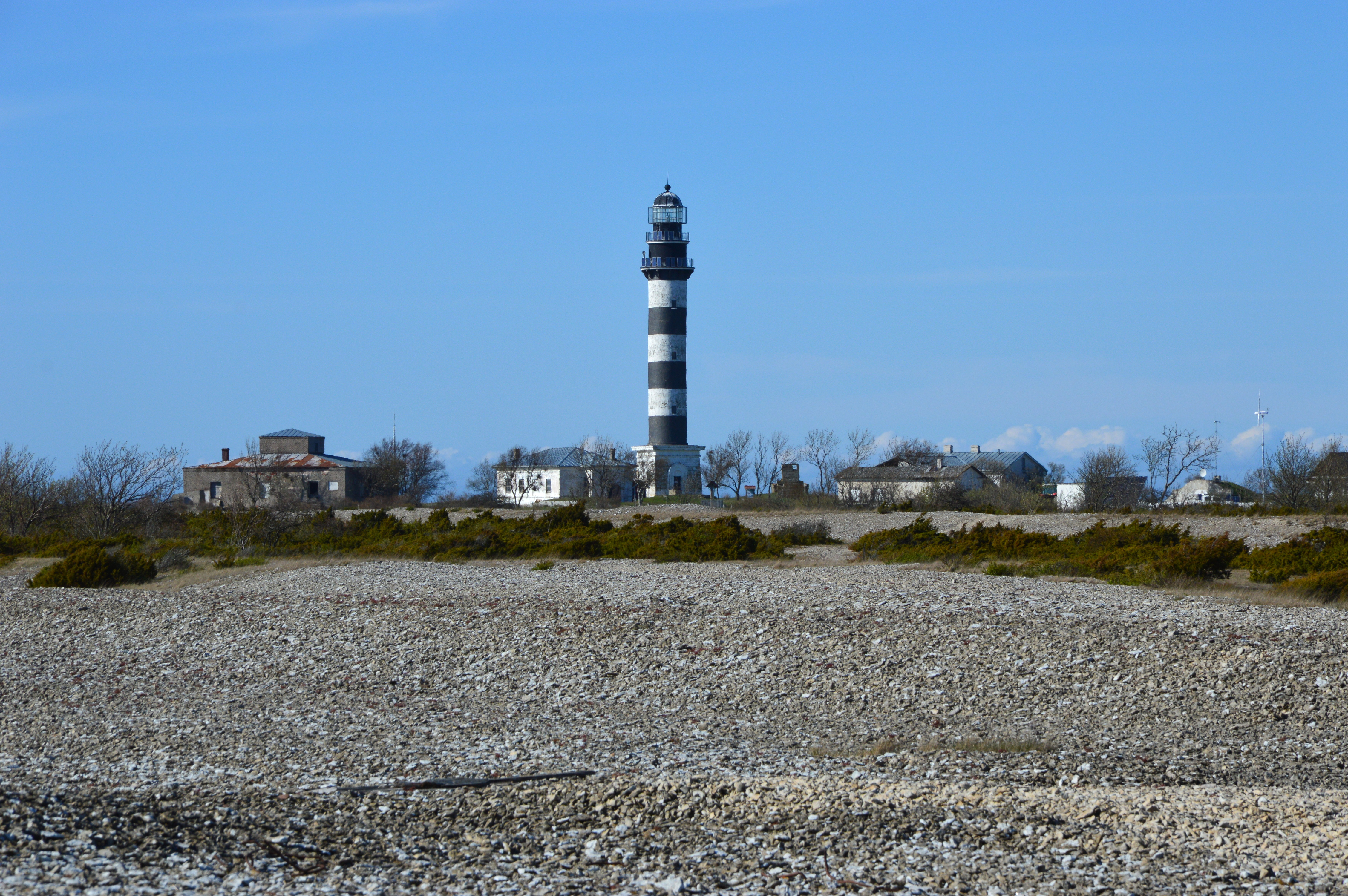 Osmussaare tuletorn koos abihoonetega.